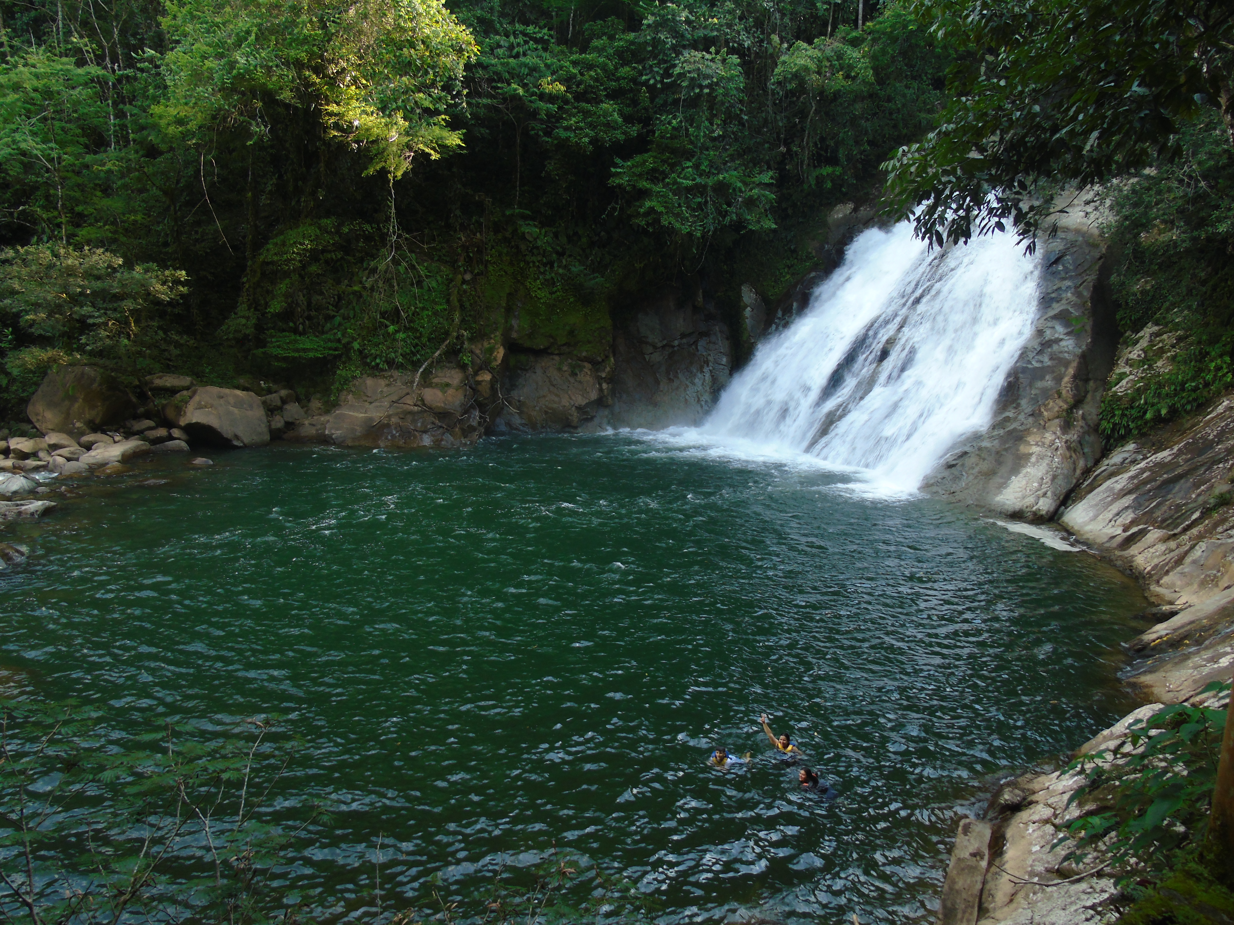 Charco y Casacada la Planta